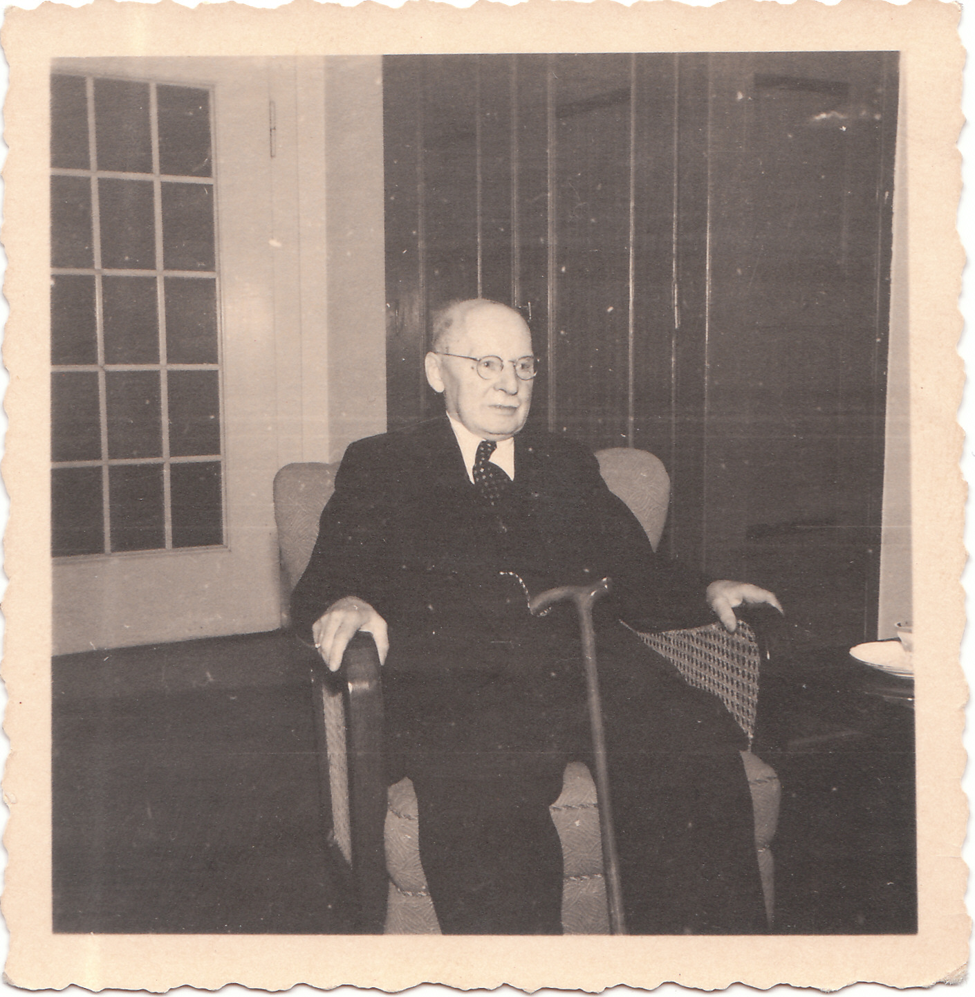 Bild von Arthur Schaarschmidt aus dem Jahre 1956